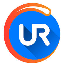 Logo-ul Browserului UR